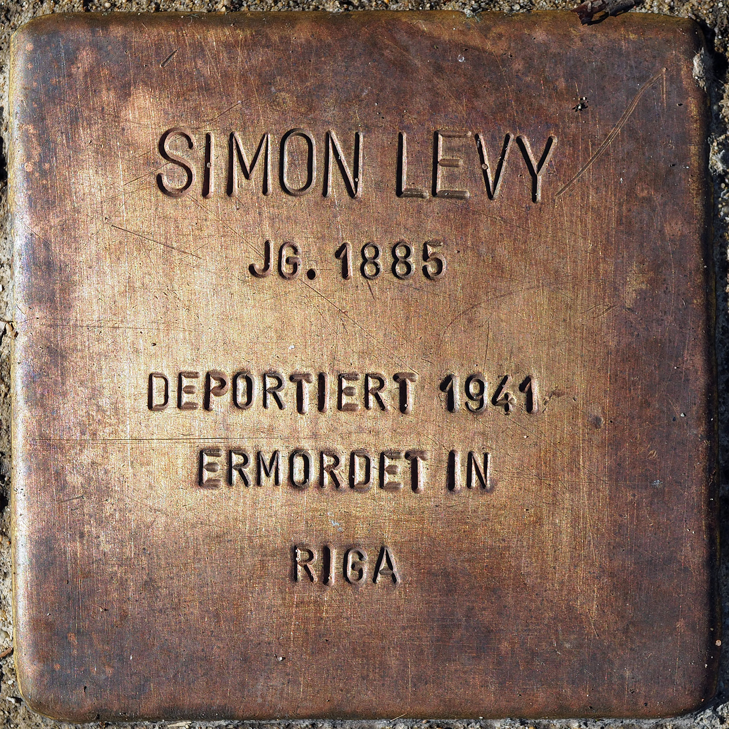 Stolperstein DU: Levy, Simon